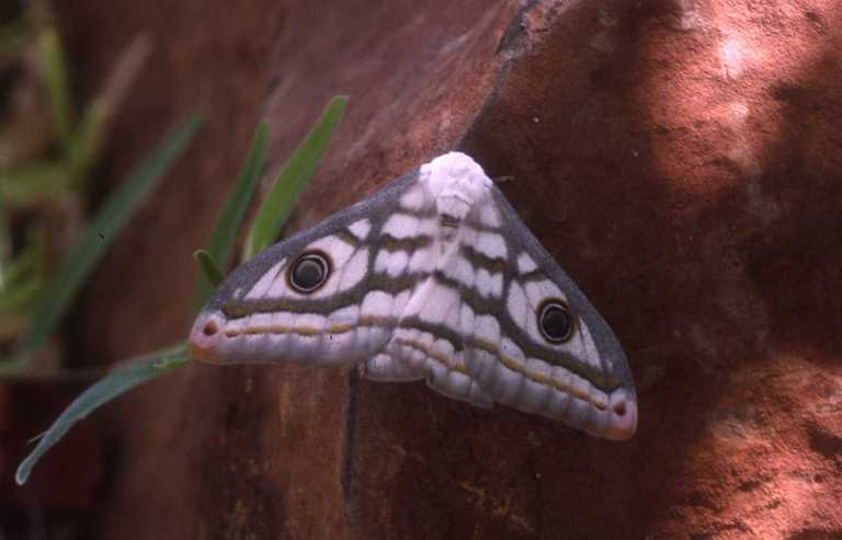 Heniocha dyops, location: Zambezi NP (Zimbabwe)